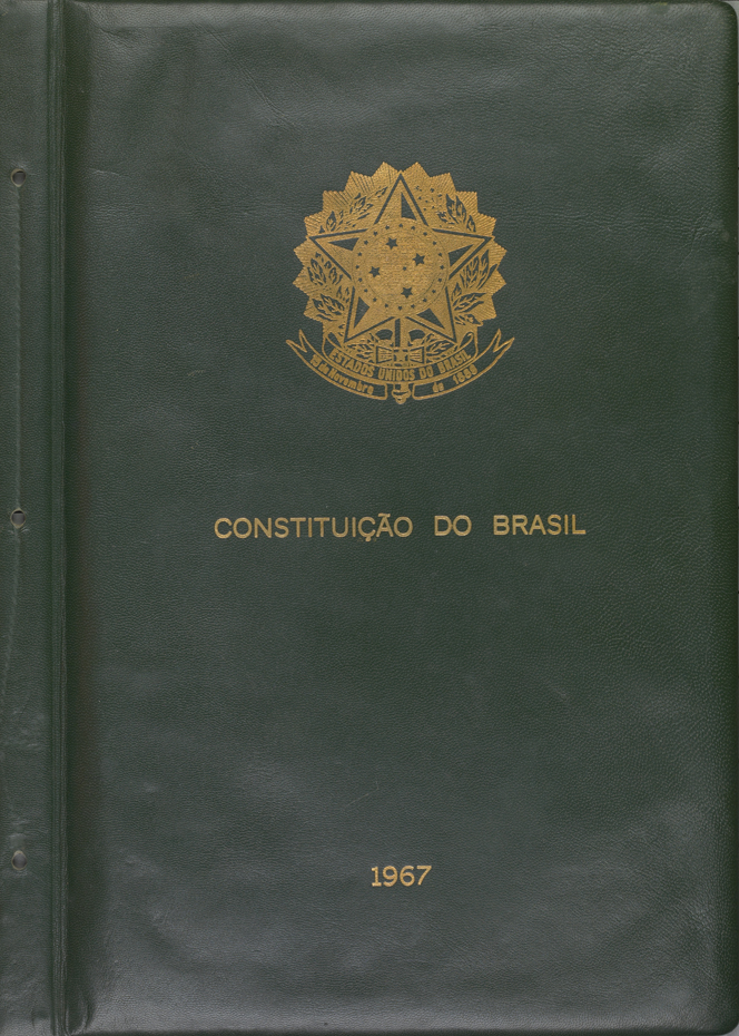 Capa Constituição 1967